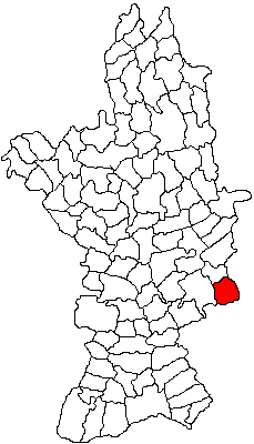 Categorie:Hărţi ale judeţului Olt